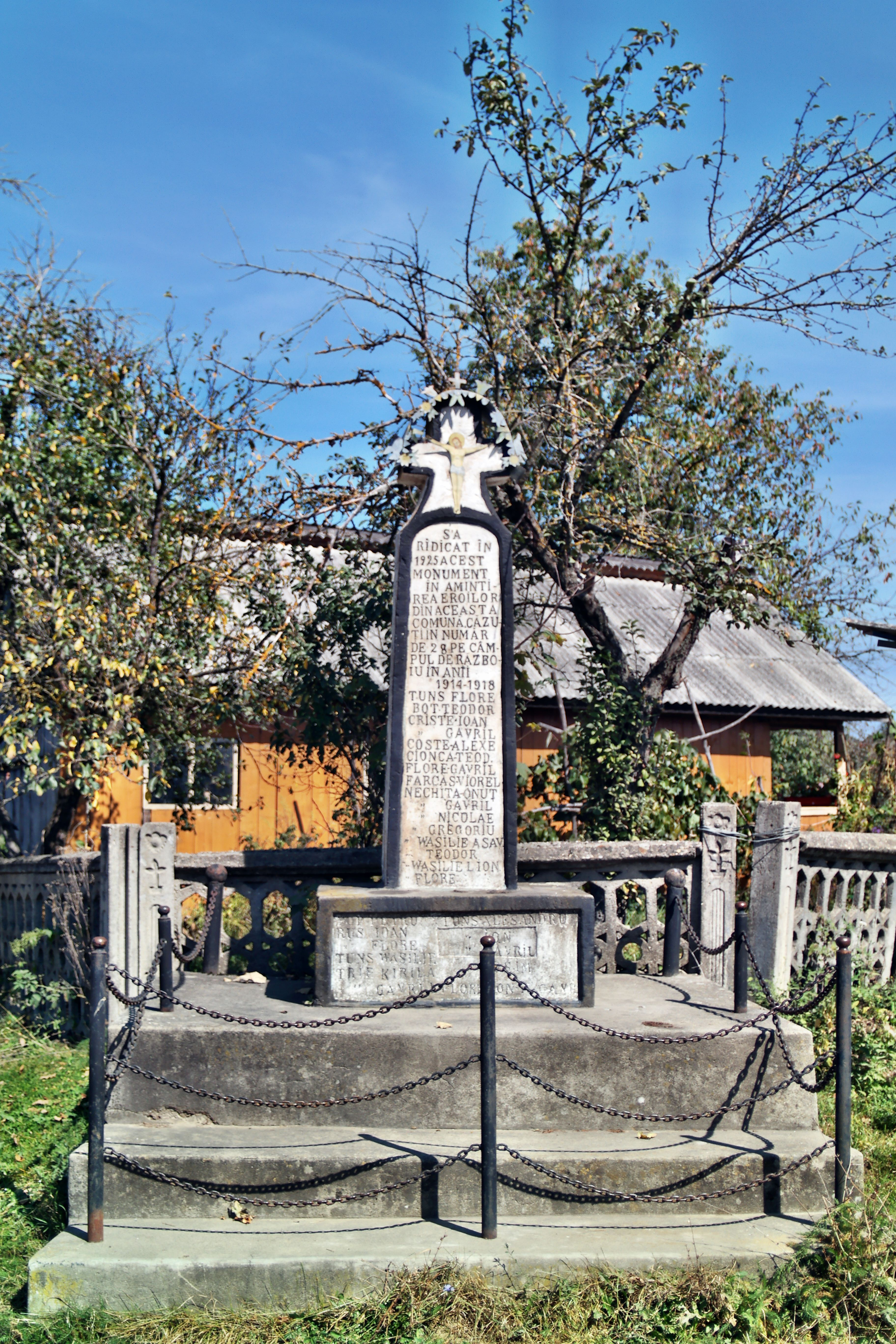 Monumentul Eroilor din satul Peteritea, Județul Maramureș.